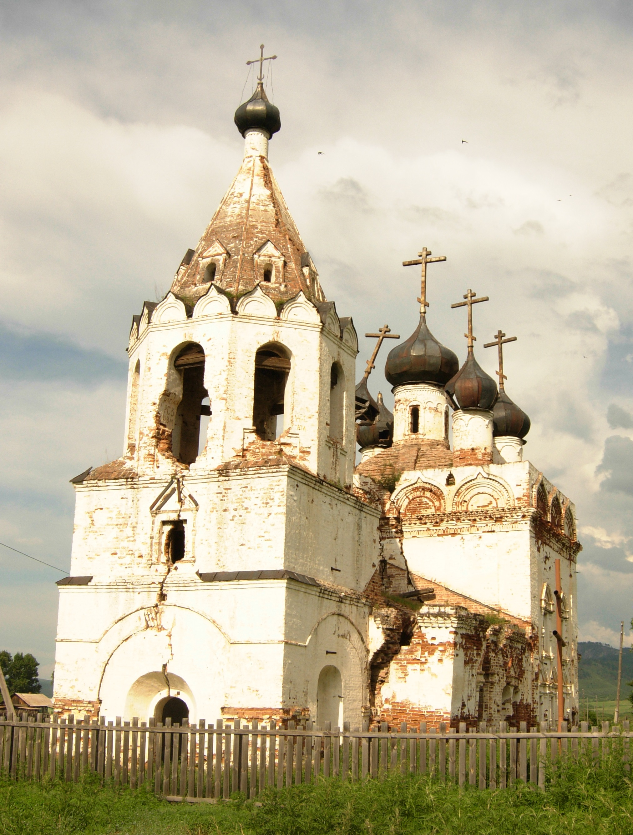 Здание Успенской церкви в селе Калинино Нерчинского района Забайкальского края. 1712